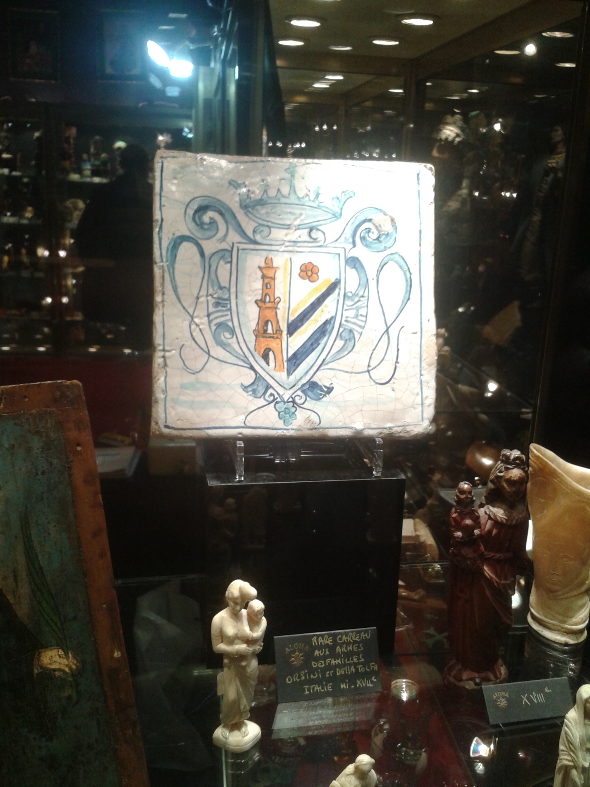 Carreau du milieu du XVIIe siècle représentant les armes des familles Orsini et Della Tolfa (erreur dans la retranscription du nom de famille dans le titre), exposé au Salon des Antiquaireq de Dijon 2013.